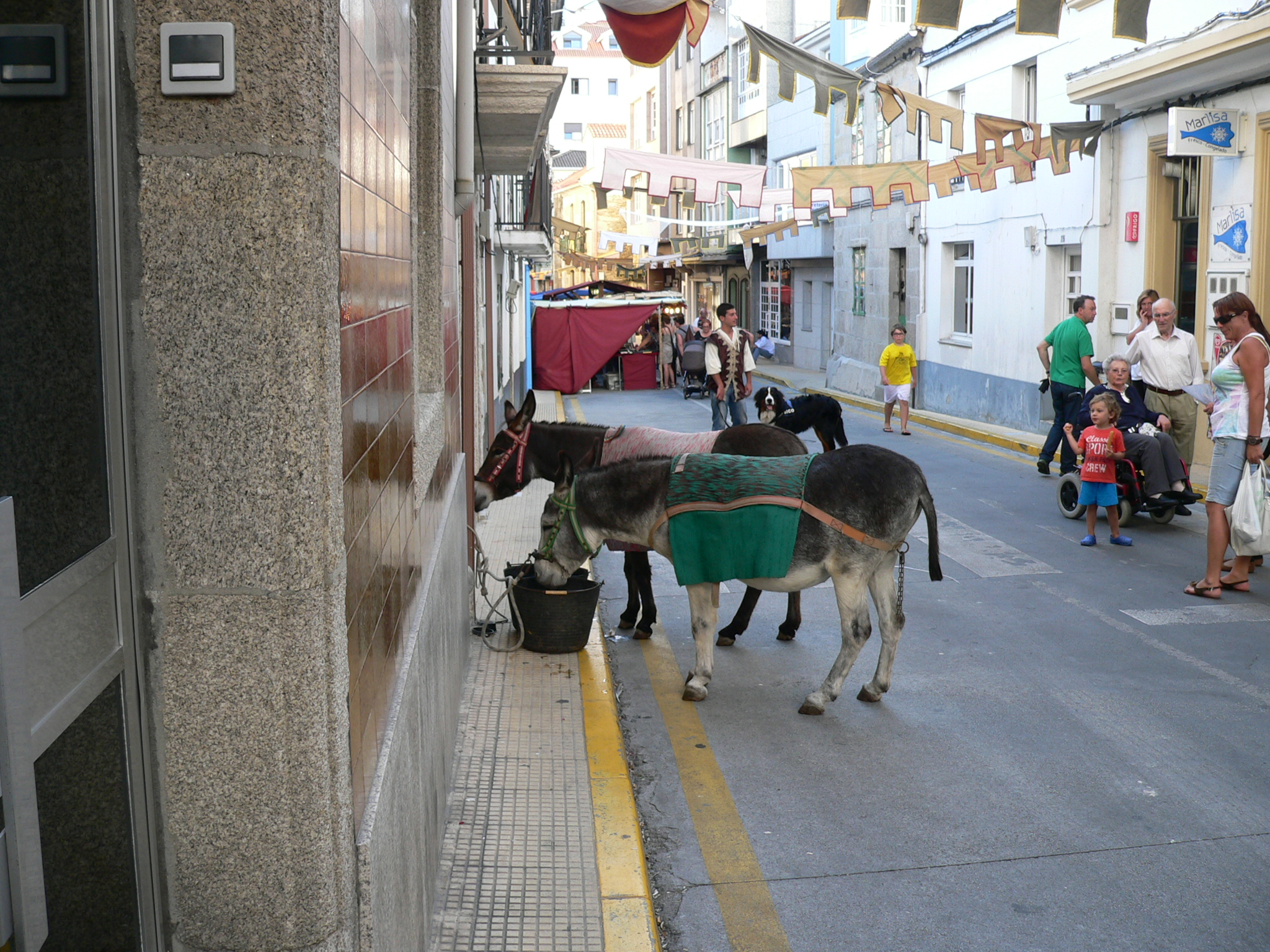 Rua de Malpica